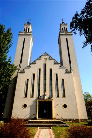 A pusztaszabolcsi Katolikus Templom a bejárat felől nézve.